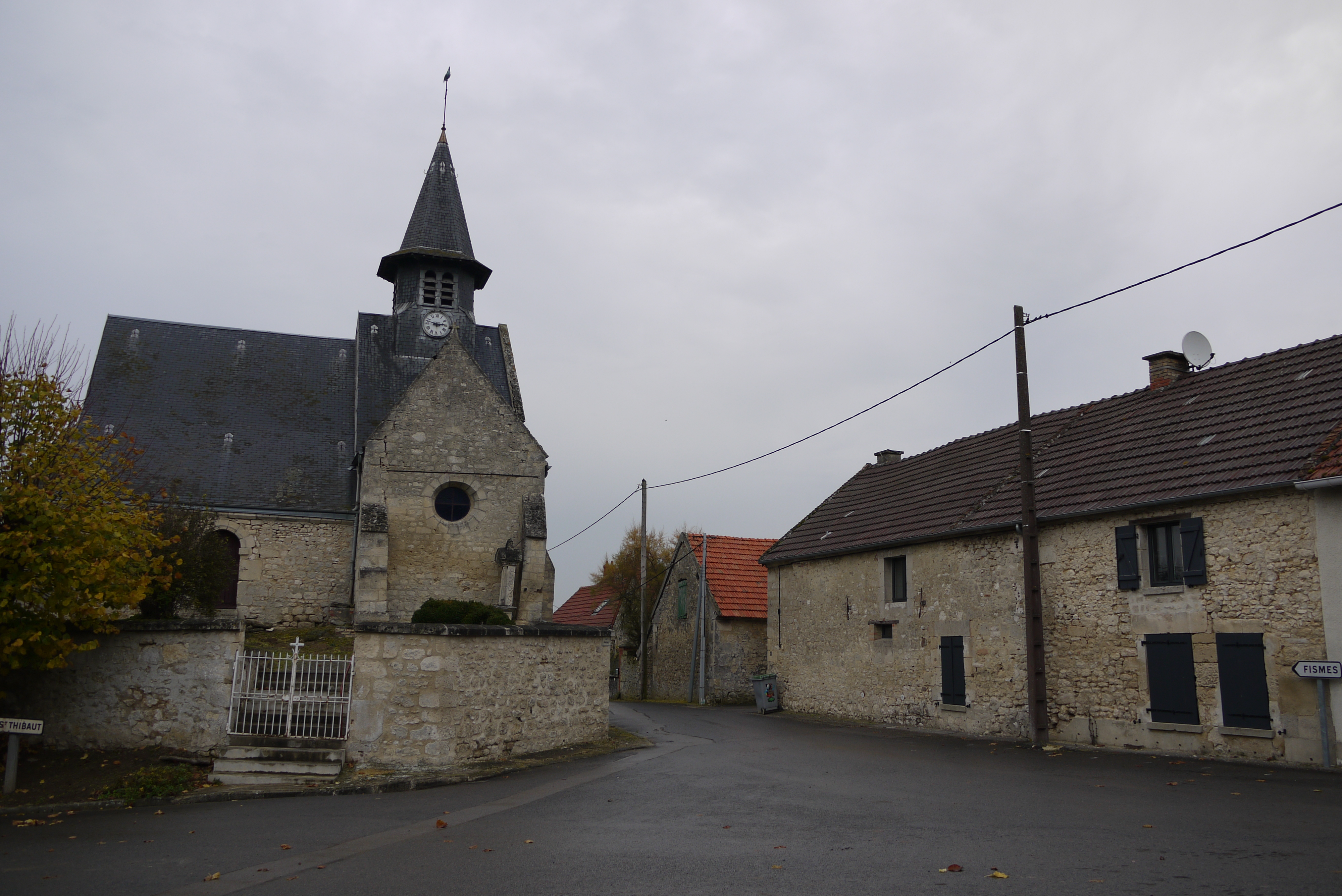 Autour de l'église de Ville-Savoye